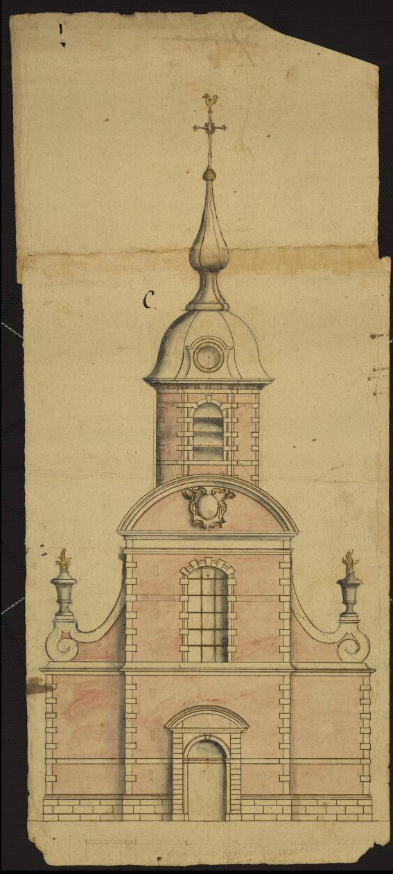 Jumet - Église Saint-Sulpice - Plan, coupes transversale et verticale, et élévation des façades principale et latérale - feuille C